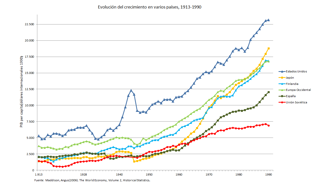 PIB per cápita 1920-1990, países seleccionados